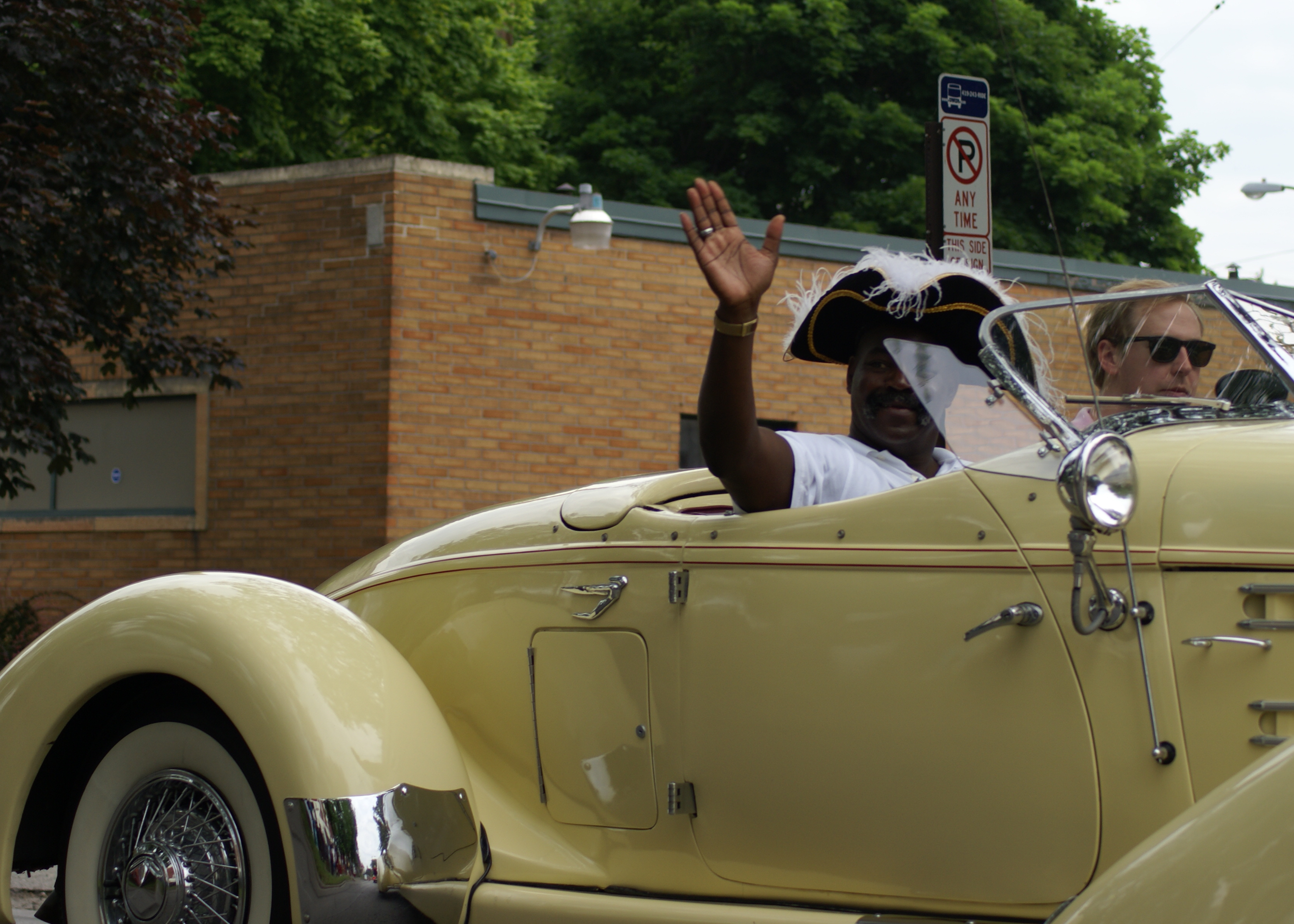 Mayor Mike Bell